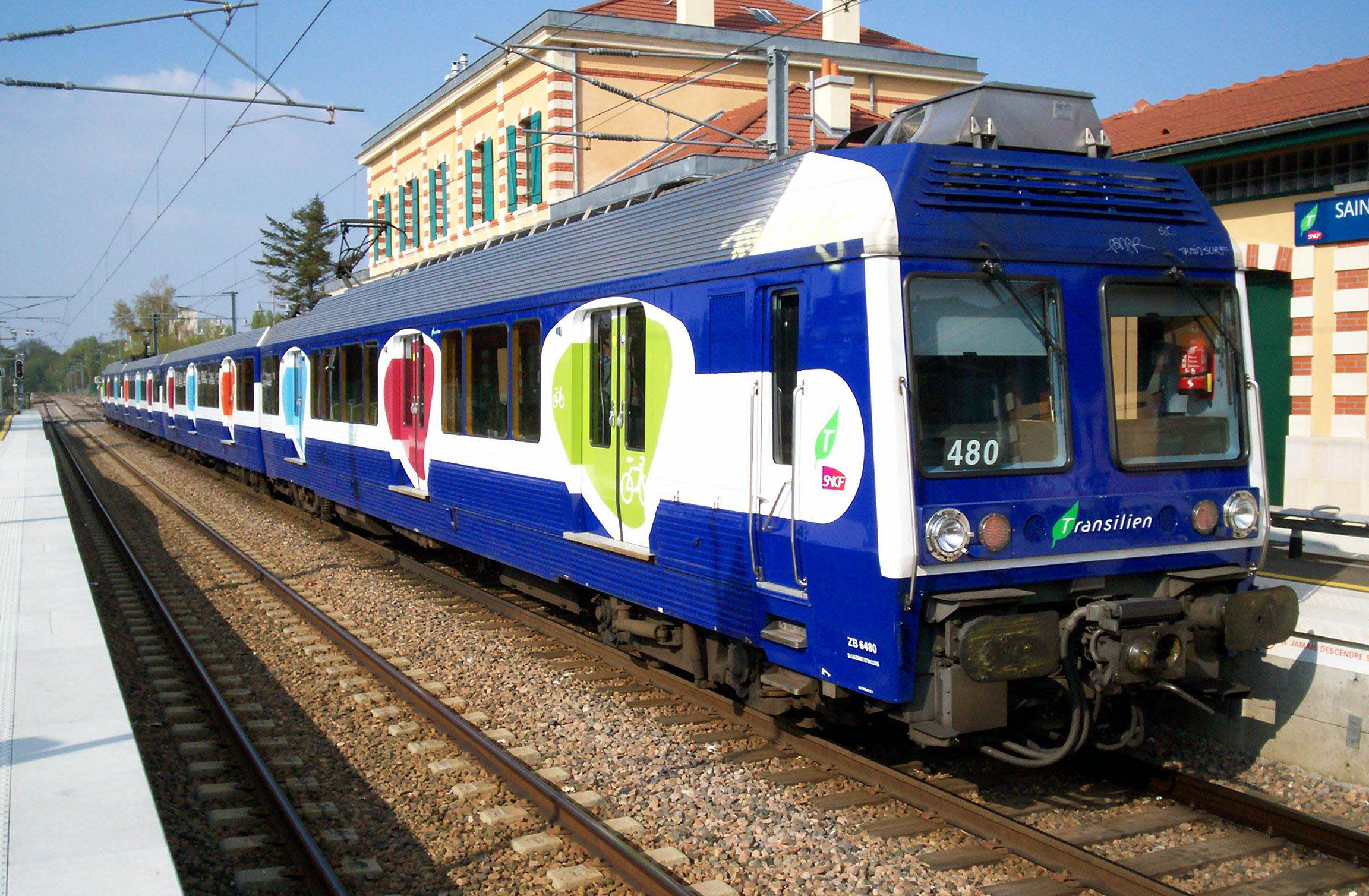 Photo d'une rame en gare terminus de Saint-Germain en Laye GC